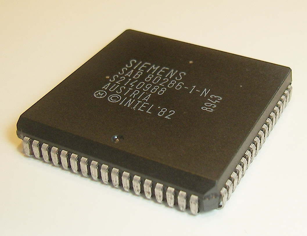 historischer Mikroprozessor vom Typ 80286-10Mhz, produziert von Siemens in Österreich